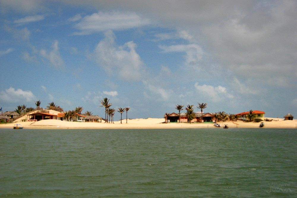 O rio Preguiça no Maranhão.No title given